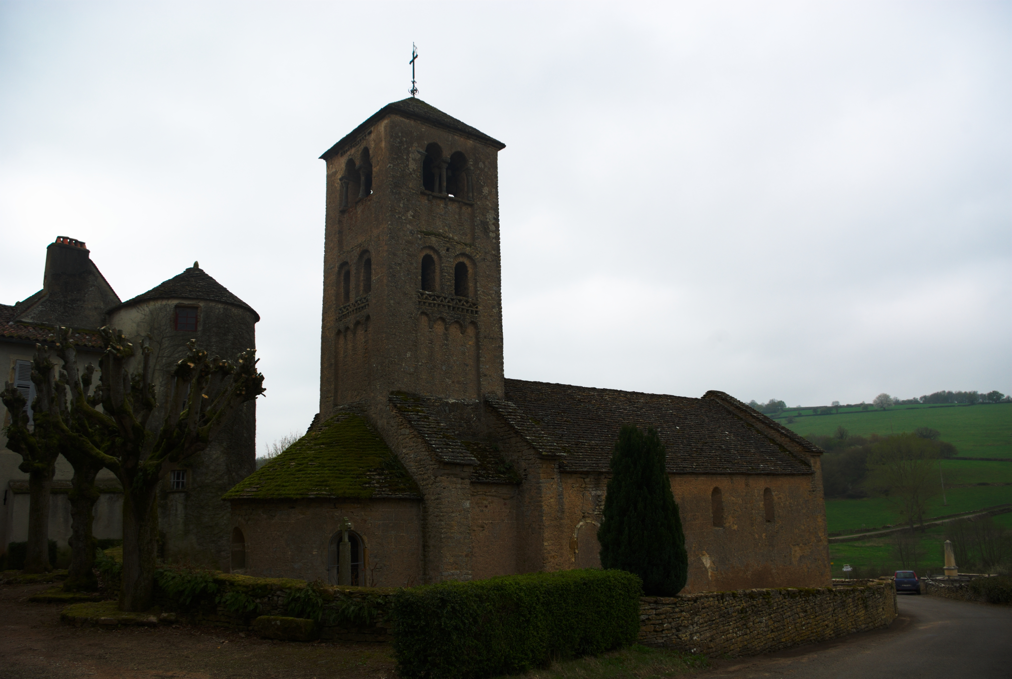 Église Saint-Denis de Massy